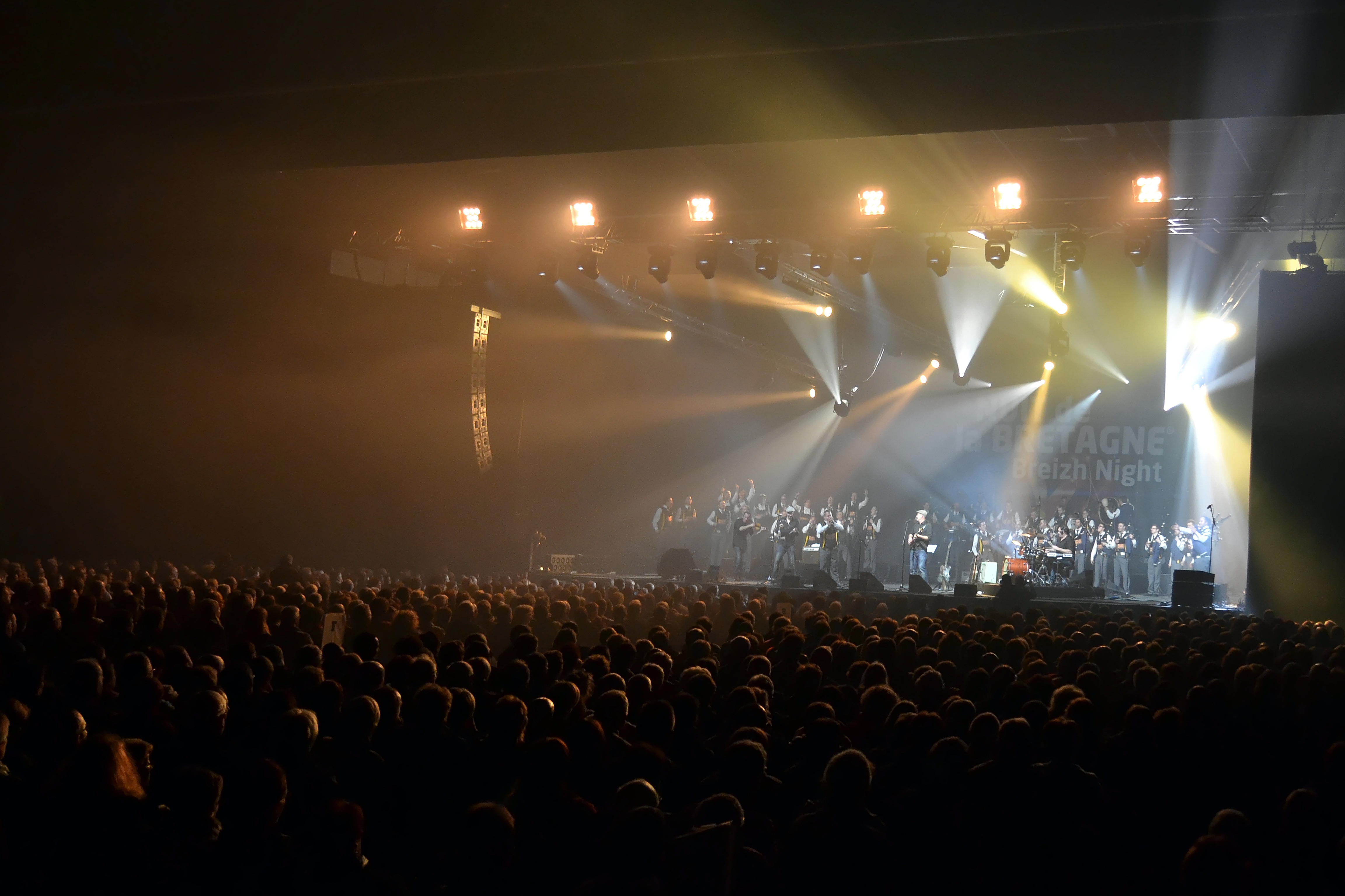 Fest-Rock en concert pour la Nuit de la Bretagne au parc de Langolvas le 11 janvier 2014.